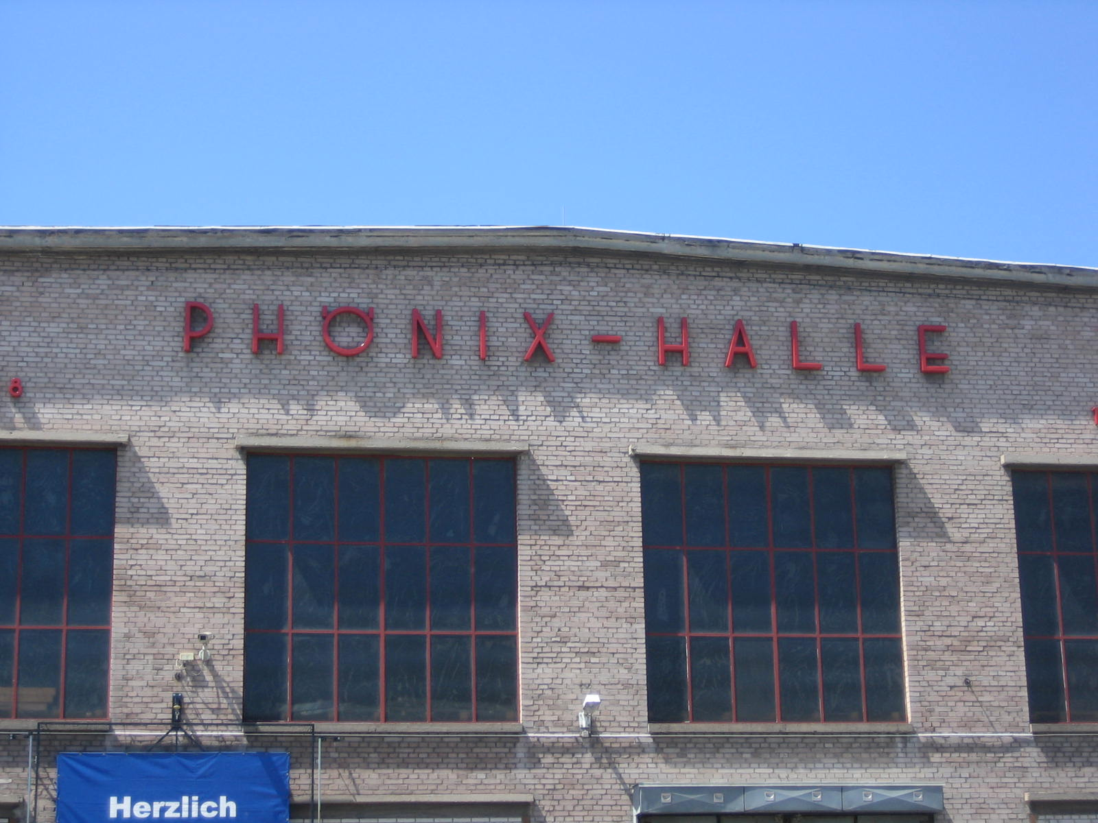 Phoenix-Halle Mainz